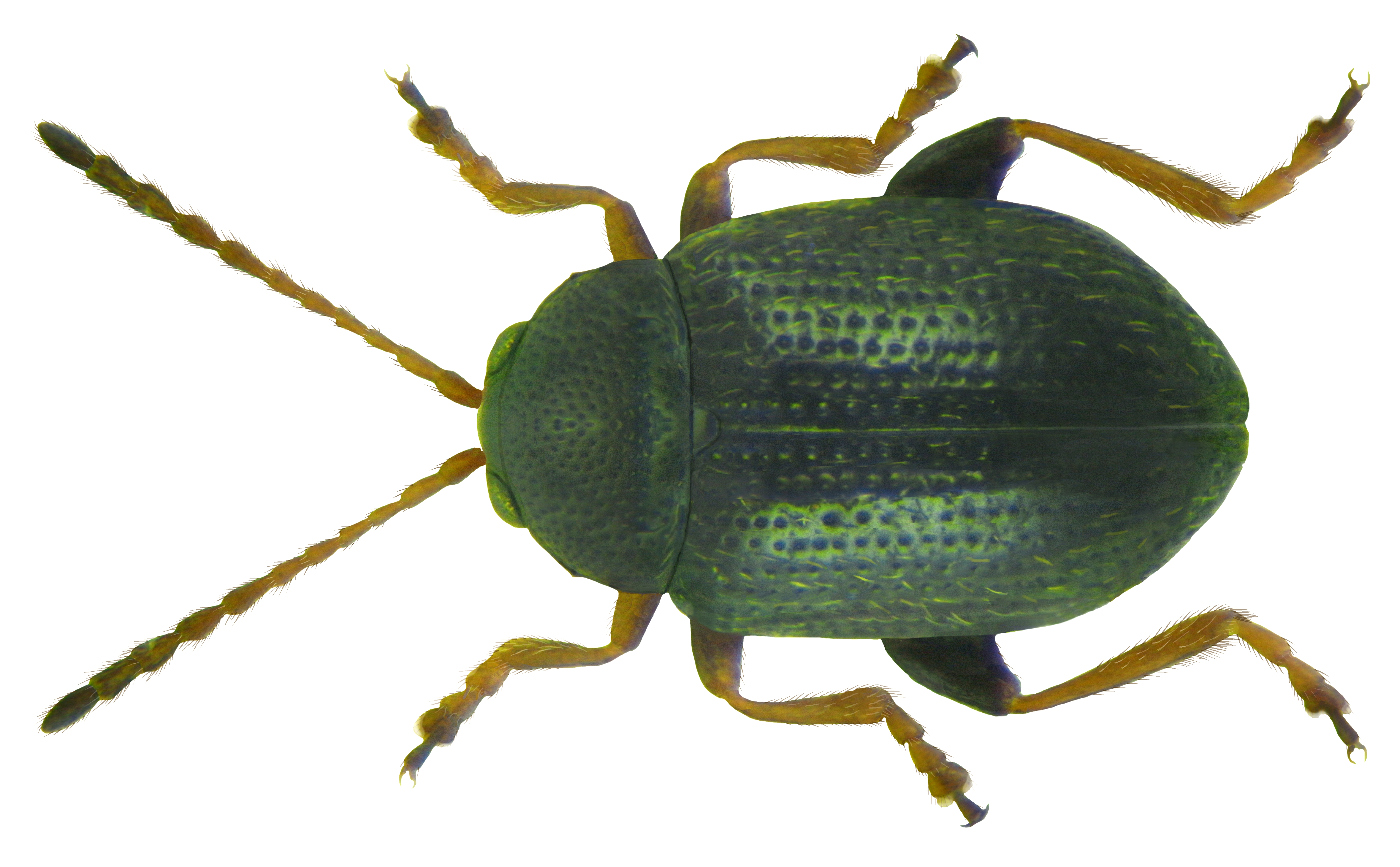 Epitrix pubescens (Koch, 1803) Familie: Chrysomelidae Groesse: 1,5-2,0 mm Verbreitung: Europa Oekologie: auf Solanium dulcamare, S. nigrum, Lycium- und Hyoscyamus-Arten Fundort: Germania, Bayern, Oberfranken, Rudolphstein leg.det. U.Schmidt, 2001 Photo: U.Schmidt, 2011